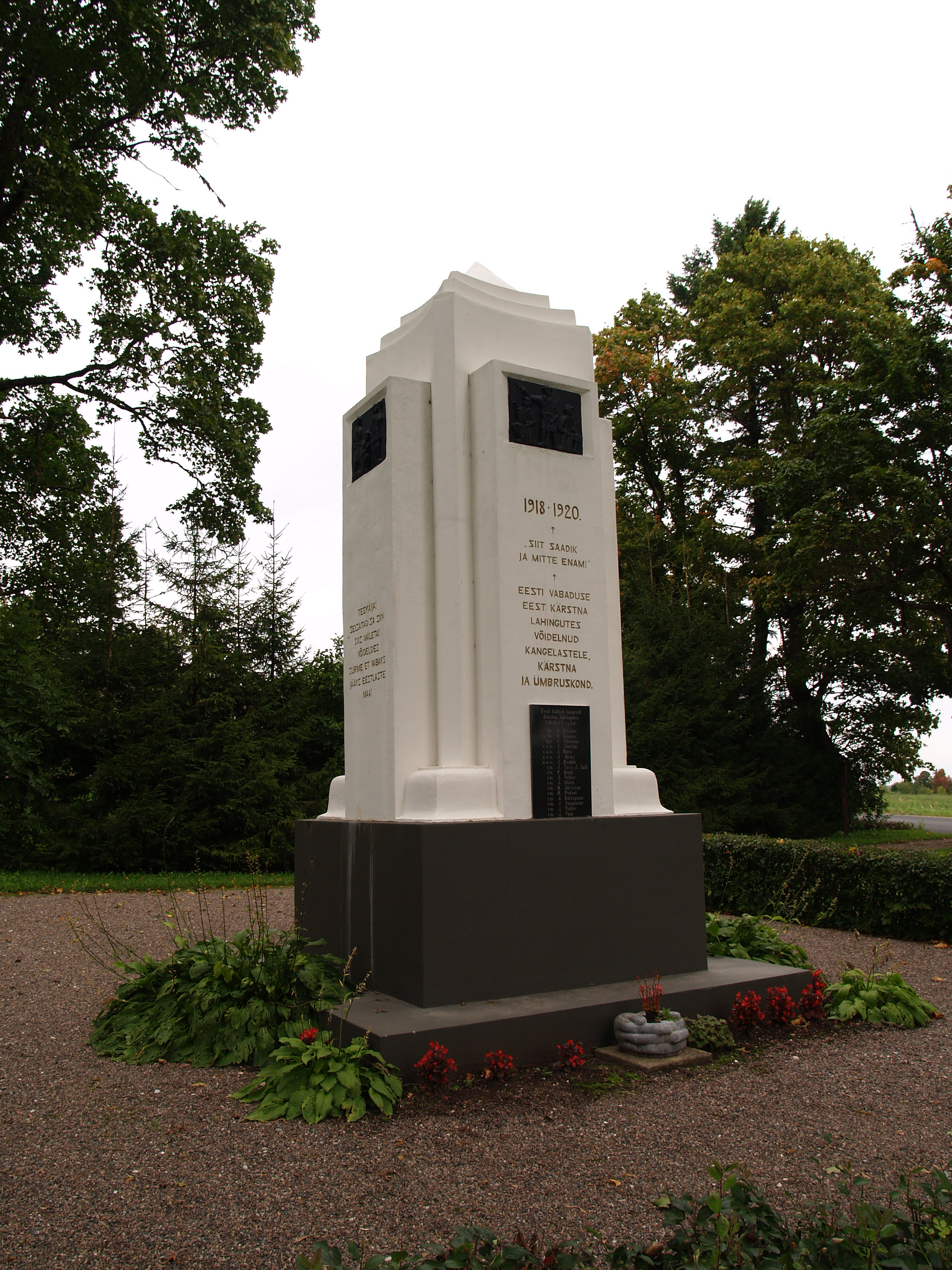 Vabadussõja Kärstna lahingu mälestussammas